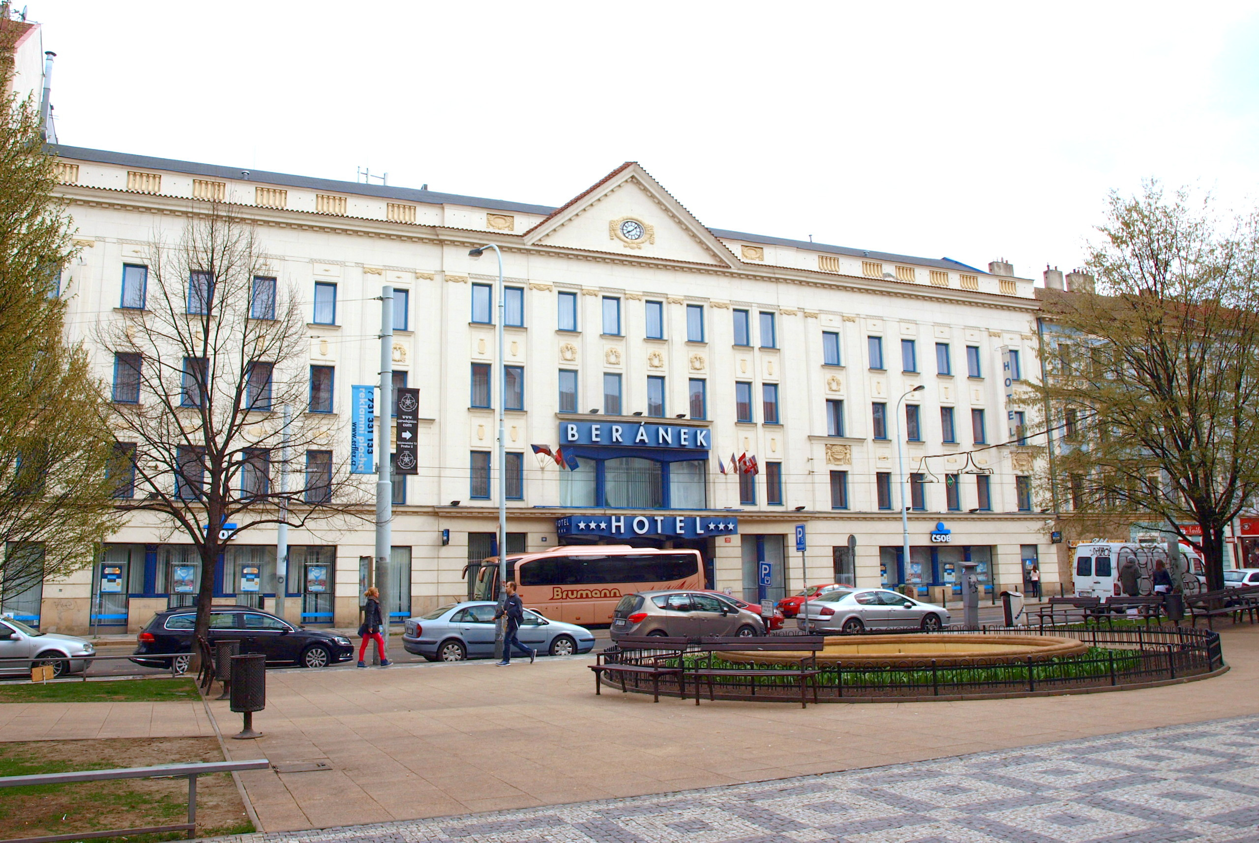 Praha, Tylovo náměstí - hotel Beránek